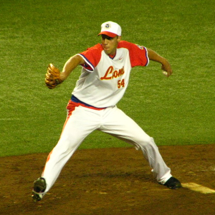 Alex Graman